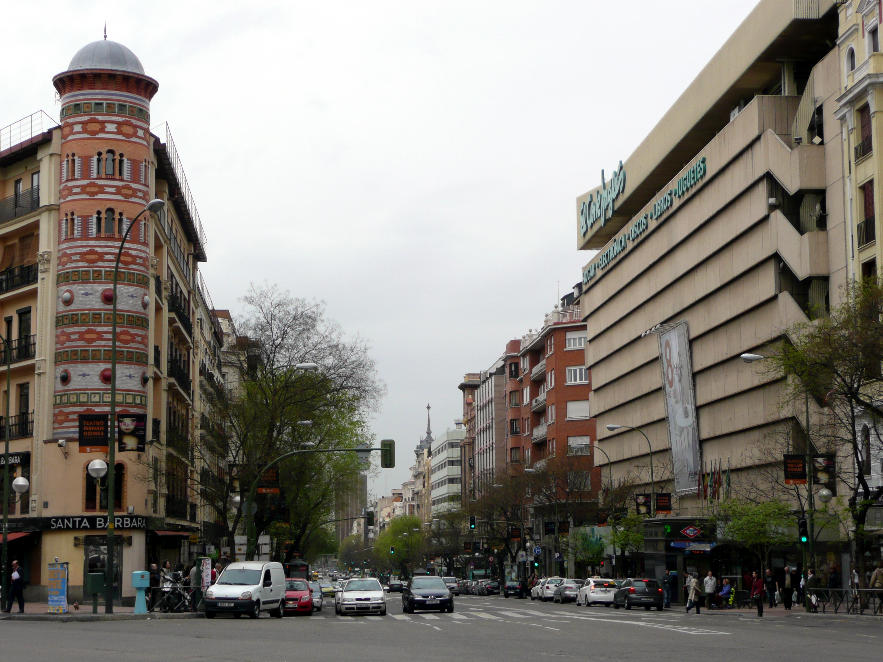 Madrid